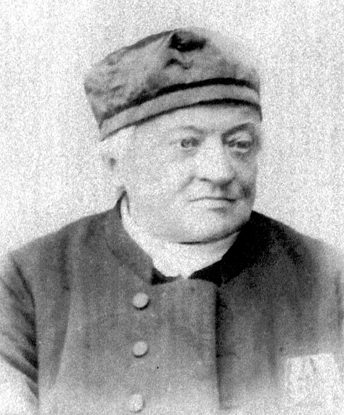 August Dächsel (1818-1901), evangelischer Theologe und Pfarrer mit etwa 80 Jahren